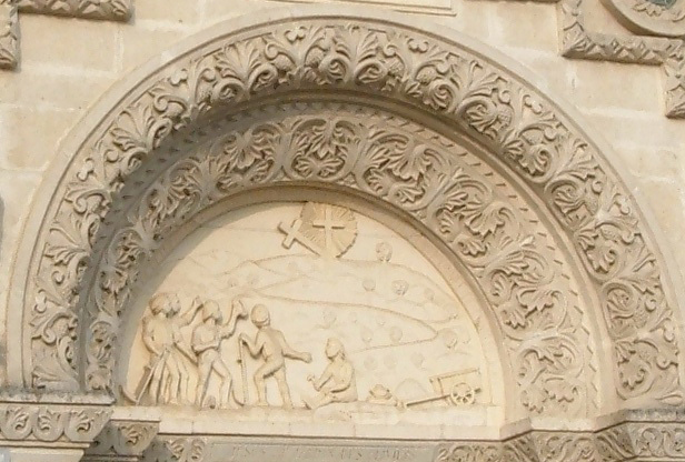 Miracle du relevement de la Croix, première chapelle de la Via Crucis, à Bétharram, France.